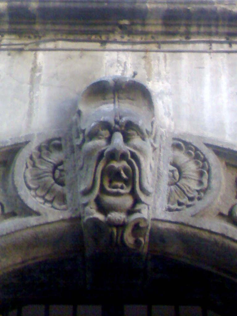 Particolare di un Palazzo al Borgo Orefici (Napoli)